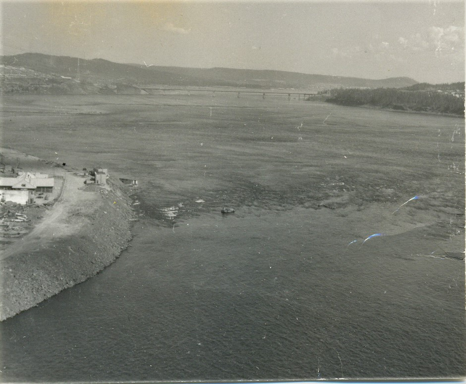 Pohled na Angaru z horní pracovní plošiny staveniště Usť-Ilimské elektrárny z výšky cca 100 m.